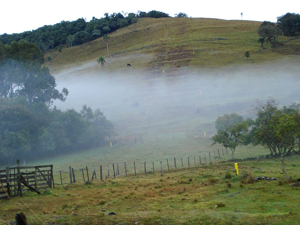 Trecho do Gasoduto Bolívia-Brasil. Interior de Taquara e Igrejinha/RS, Brasil.